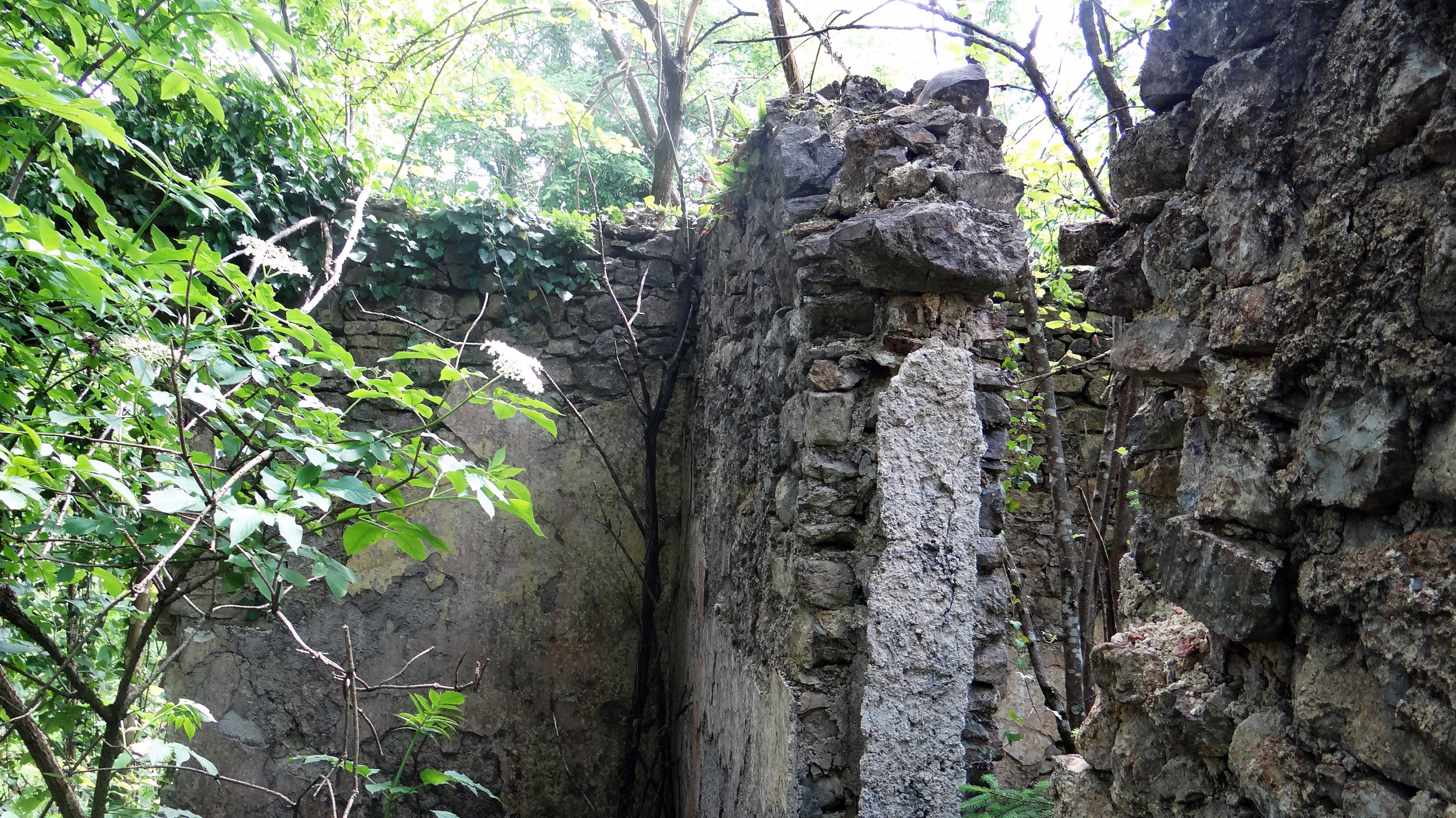 Ruševina dvorca Čretež I. (Reitenburg), Dolenje Laknice